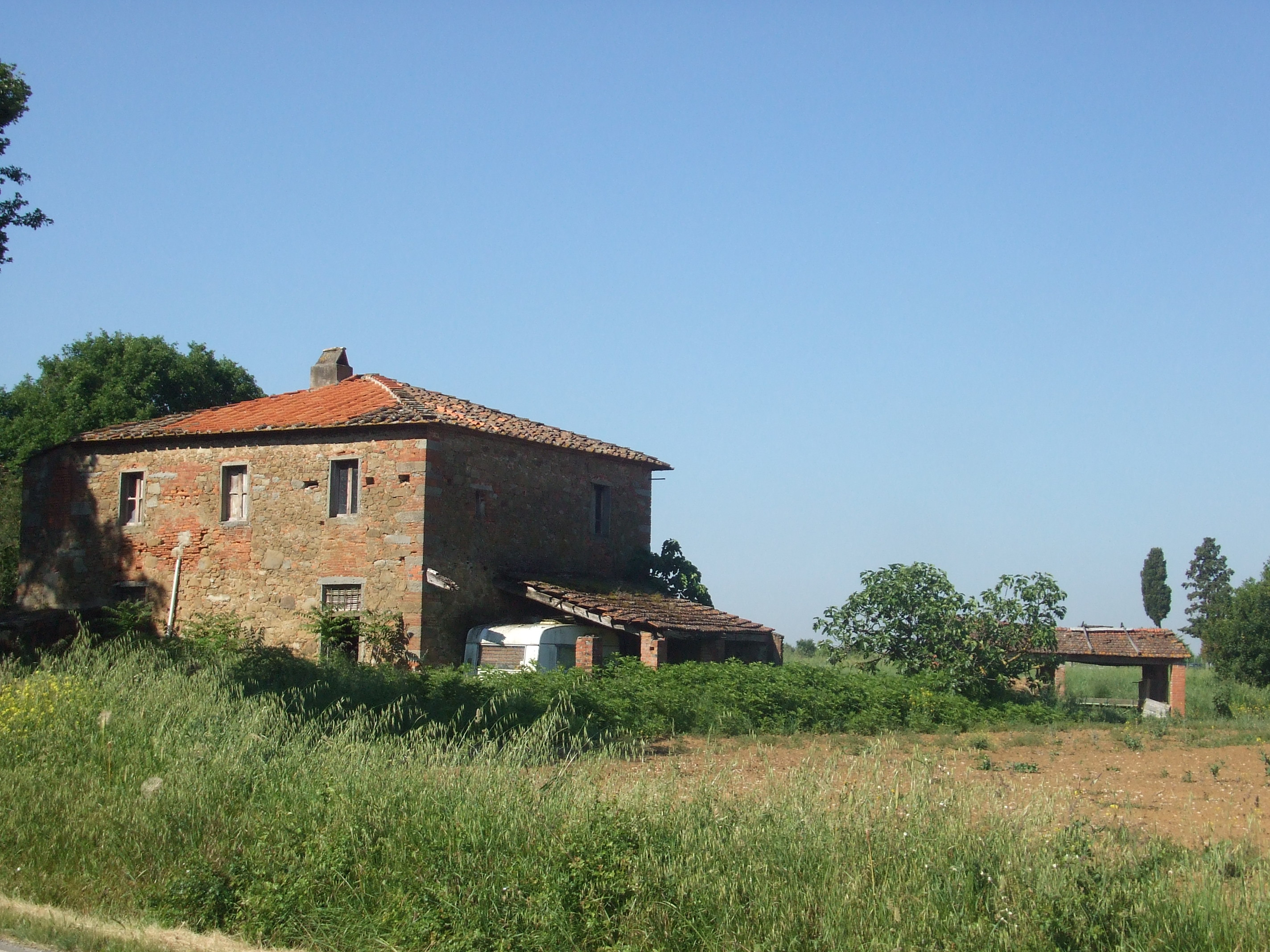 Antica casa rurale all'inizio di Castroncello